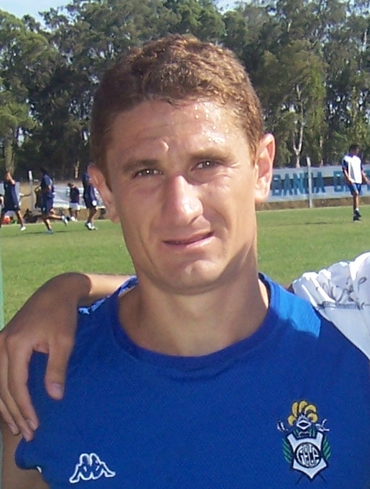 Foto del futbolista argentino Patricio Graff, durante la pretemporada de Gimnasia y Esgrima La Plata llevada a cabo en Mar del Plata en el verano de 2009.